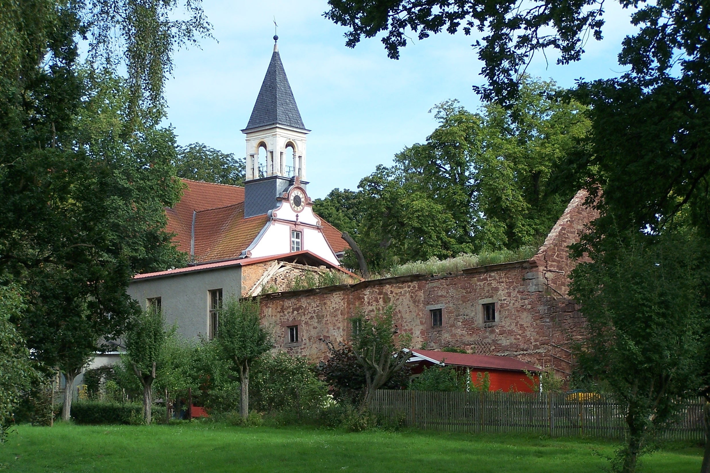 Ansichten und Details zum Oberen Schloss in Gehaus.